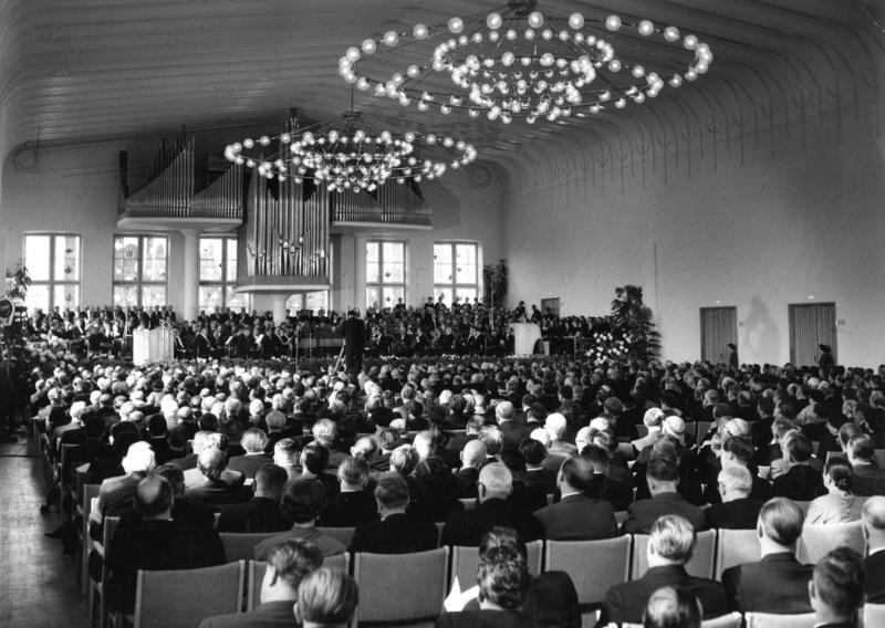 Eröffnung des Gürzenich in Köln am 2.10.1955